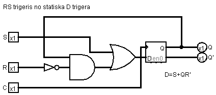 RStoD